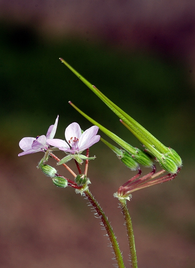 Kurdî: Nikon d80/sigma 105mm